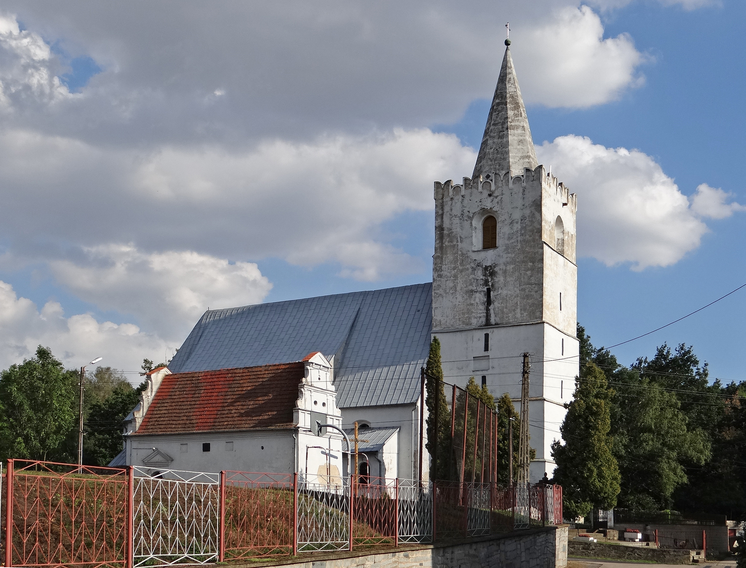 Doboszowice, zespół kościoła par. p.w. św. Mikołaja, XV, XVIII